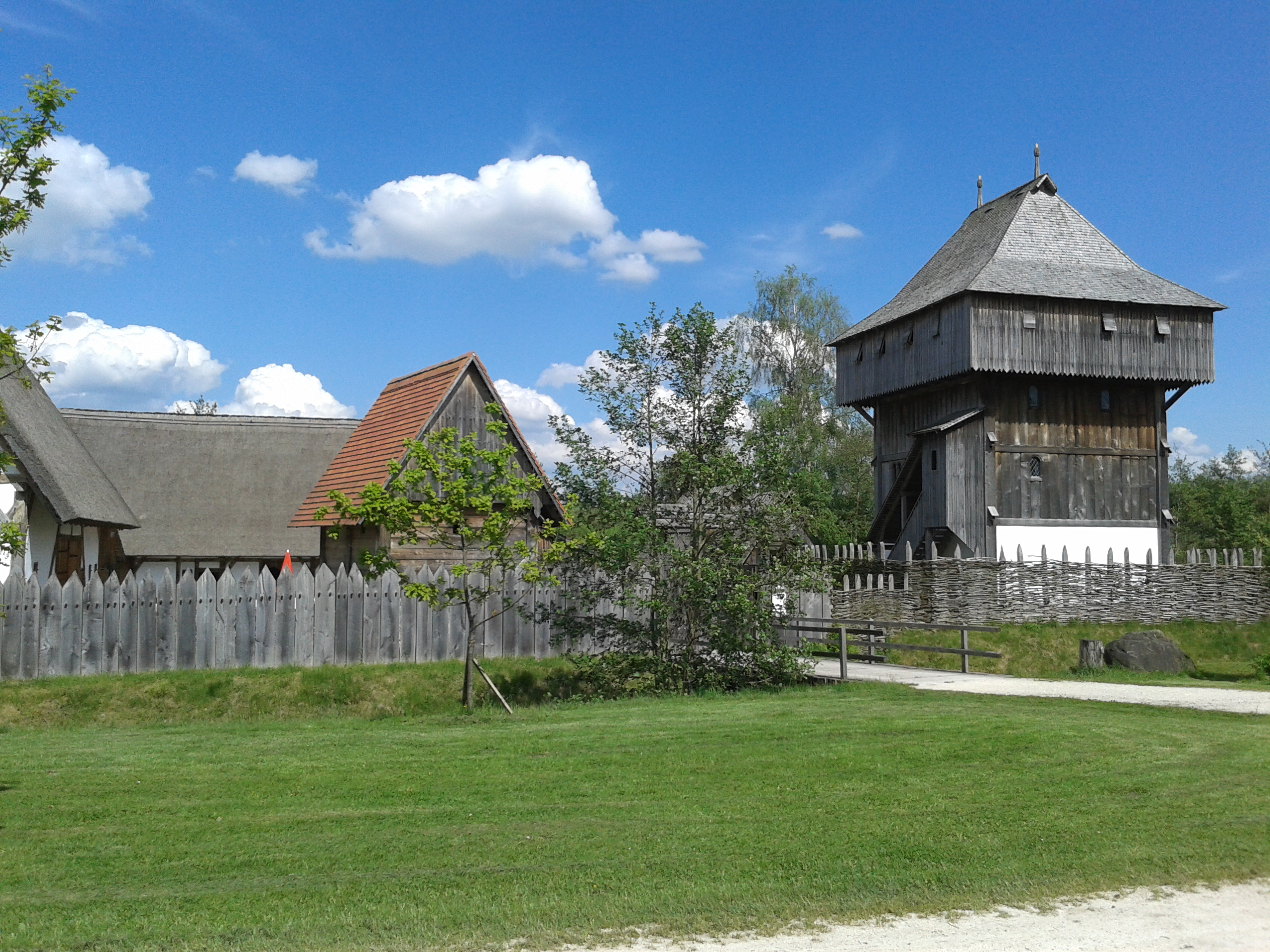 Bachritterburg Kanzach, Riedlinger Str. 12, 88422 Kanzach